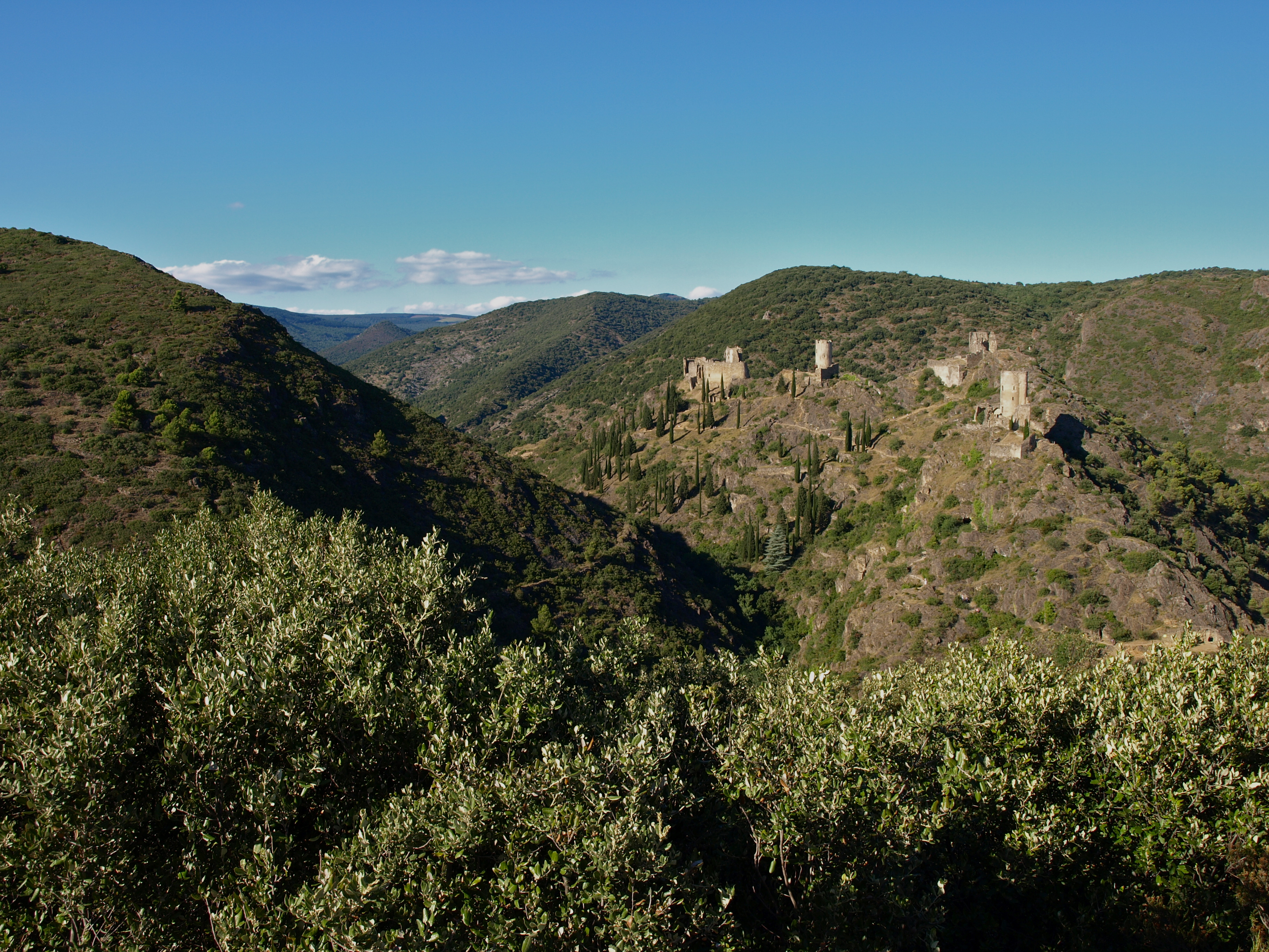 Panorama général sur les 4 châteaux de Lastours .